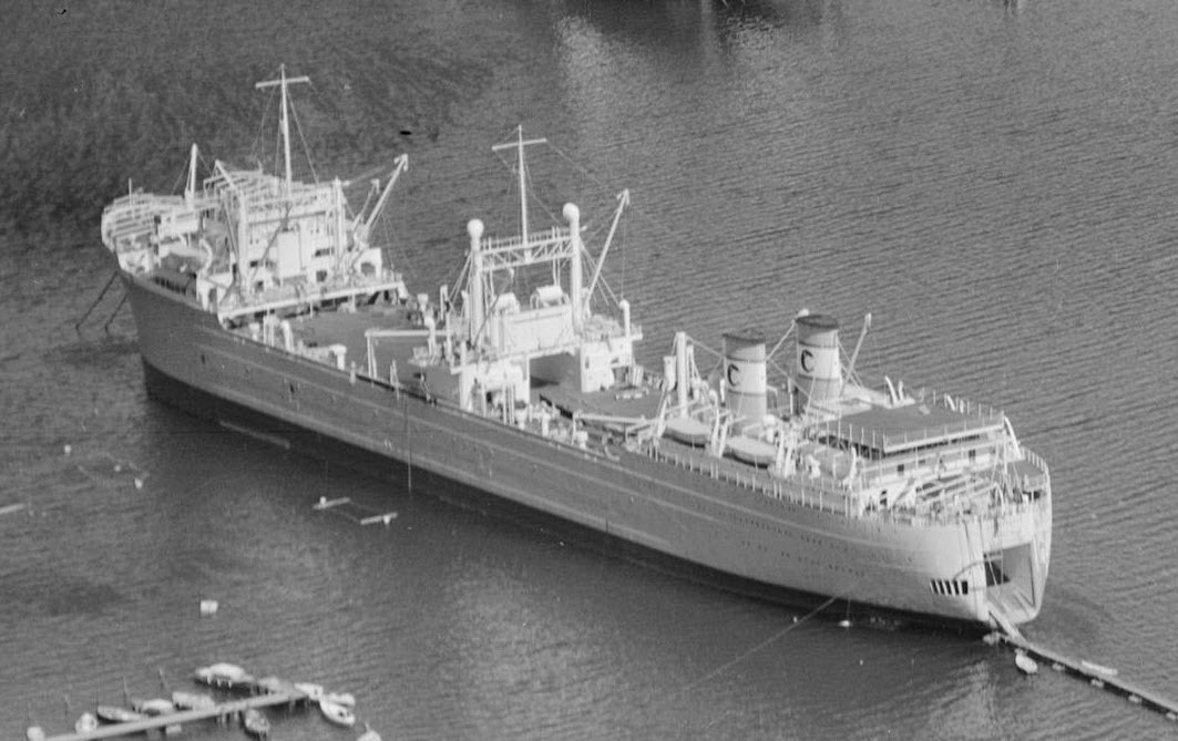 Hvalkokeriet Thorshavet